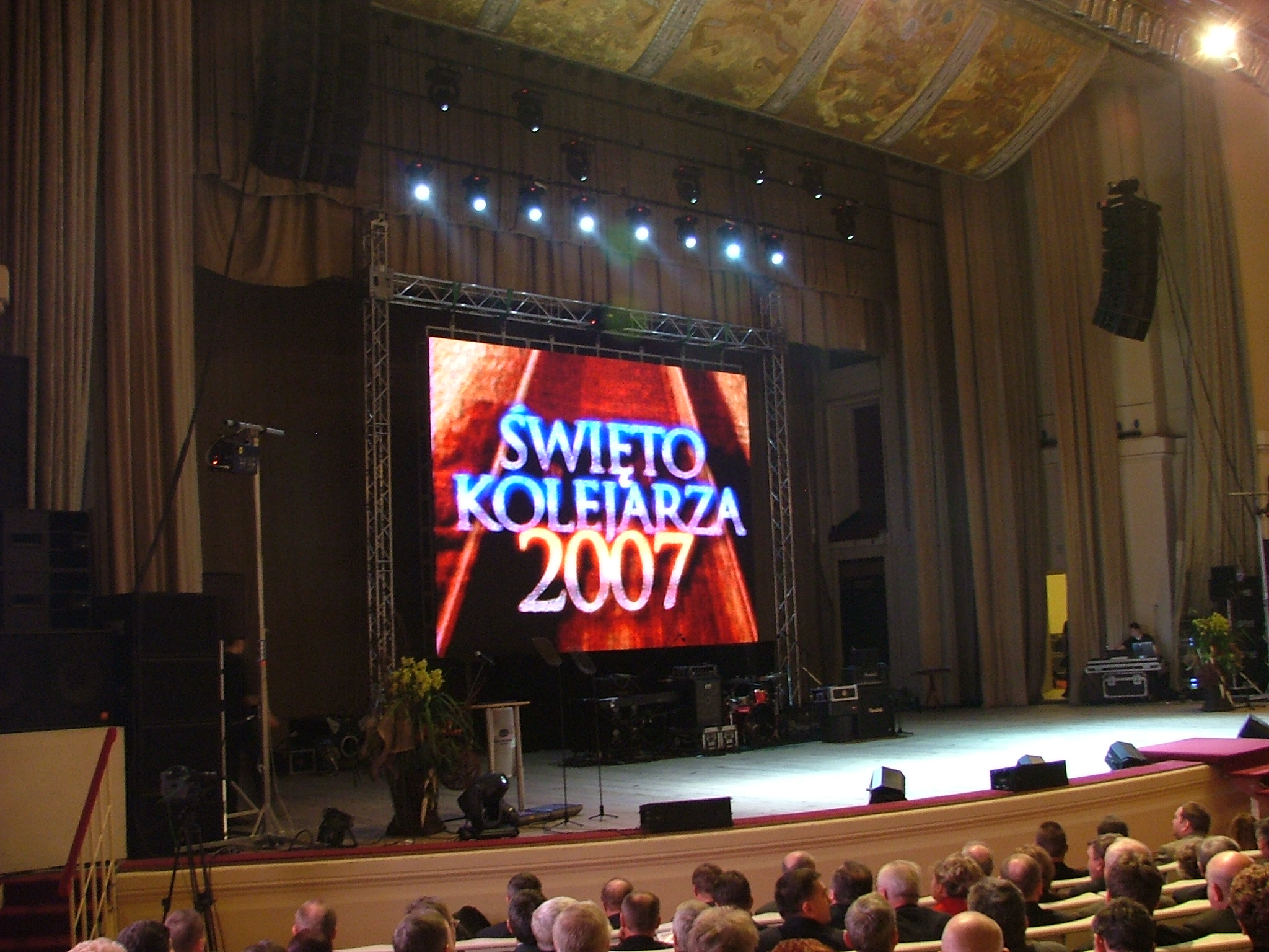 Centralne Obchody Święta Kolejarza 2007, Warszawa, Sala Kongresowa